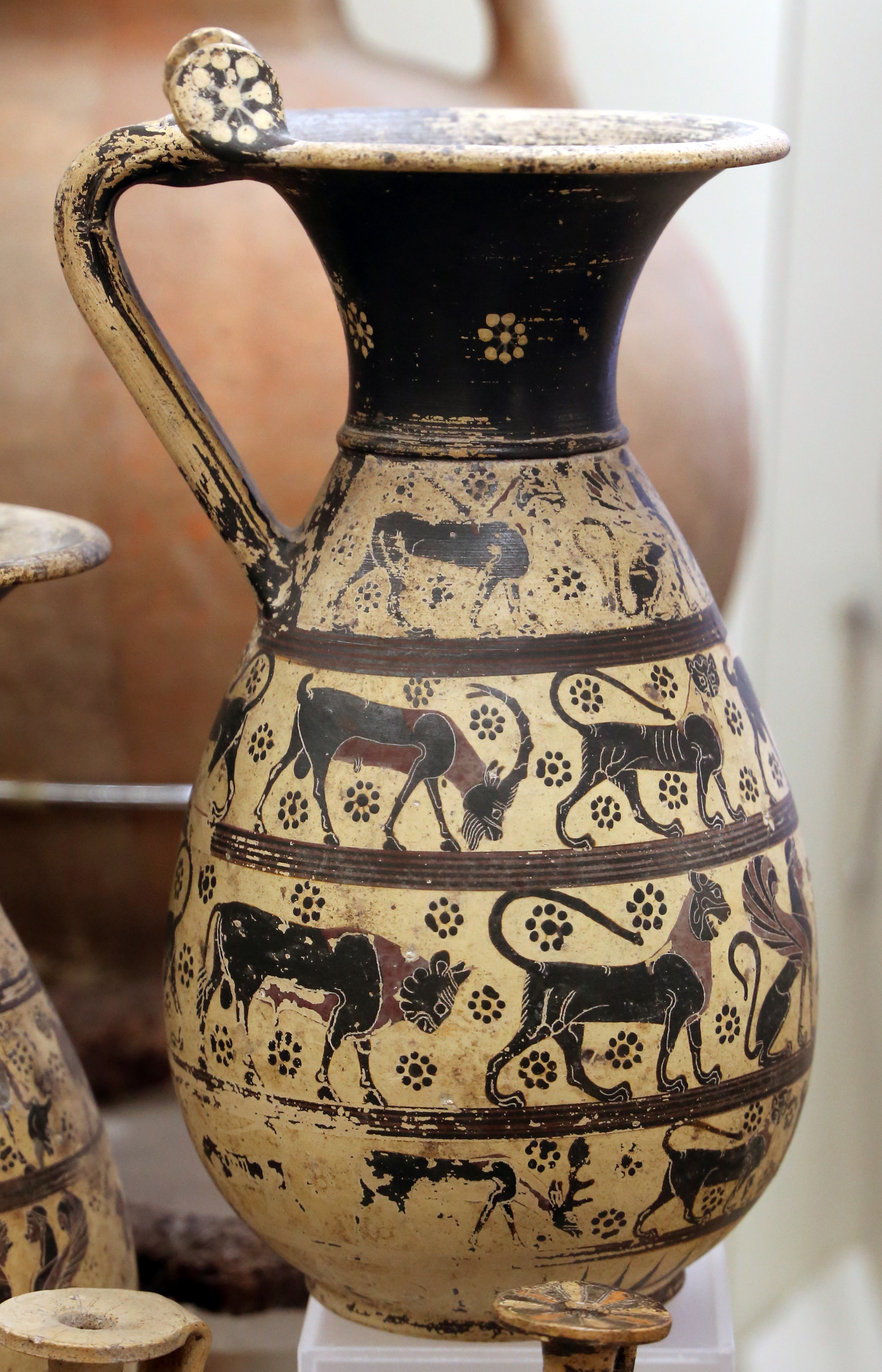 Villa Giulia (Rome) This is a photo of a monument which is part of cultural heritage of Italy.